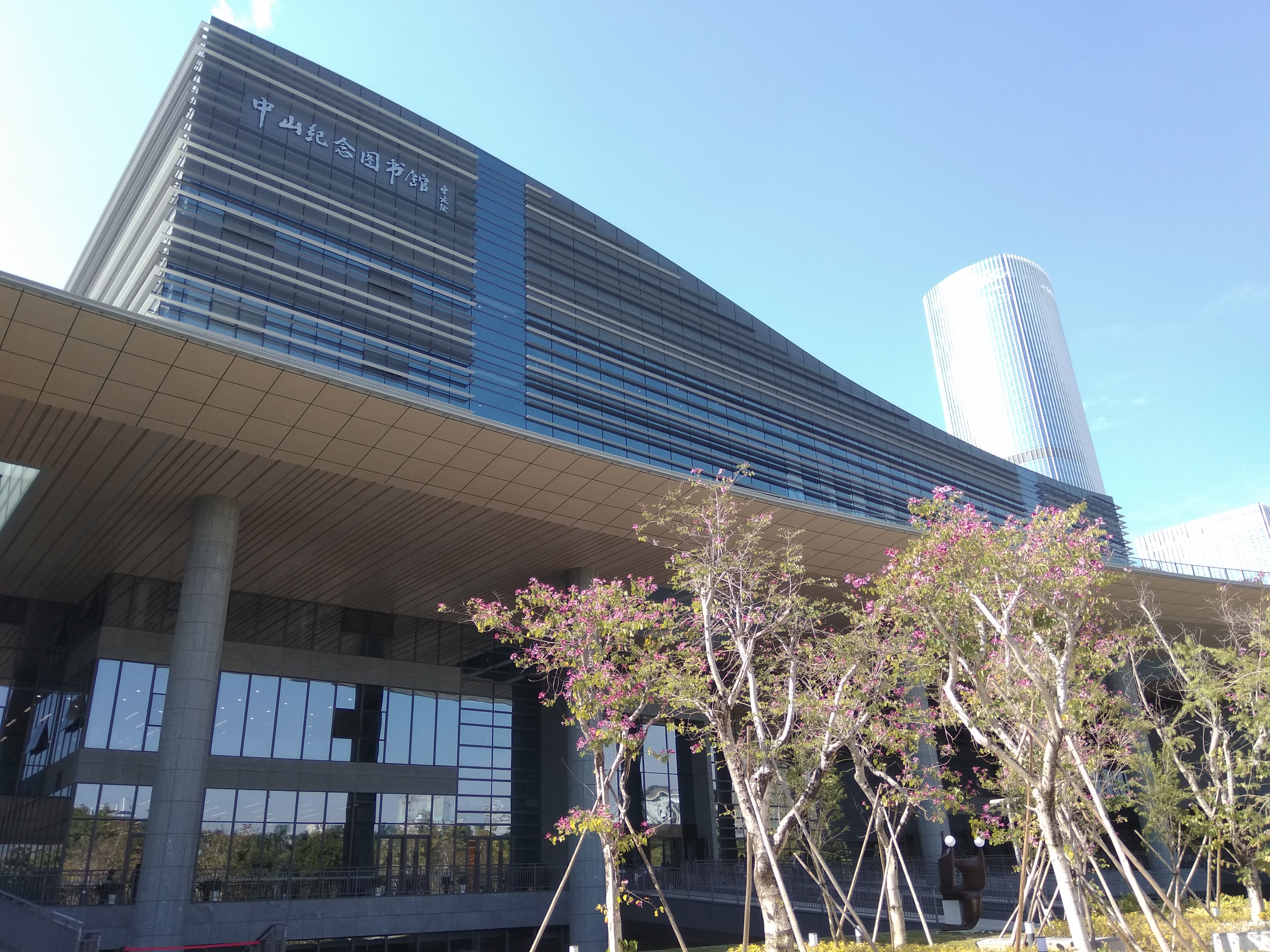 中文（中国大陆）: 中山纪念图书馆